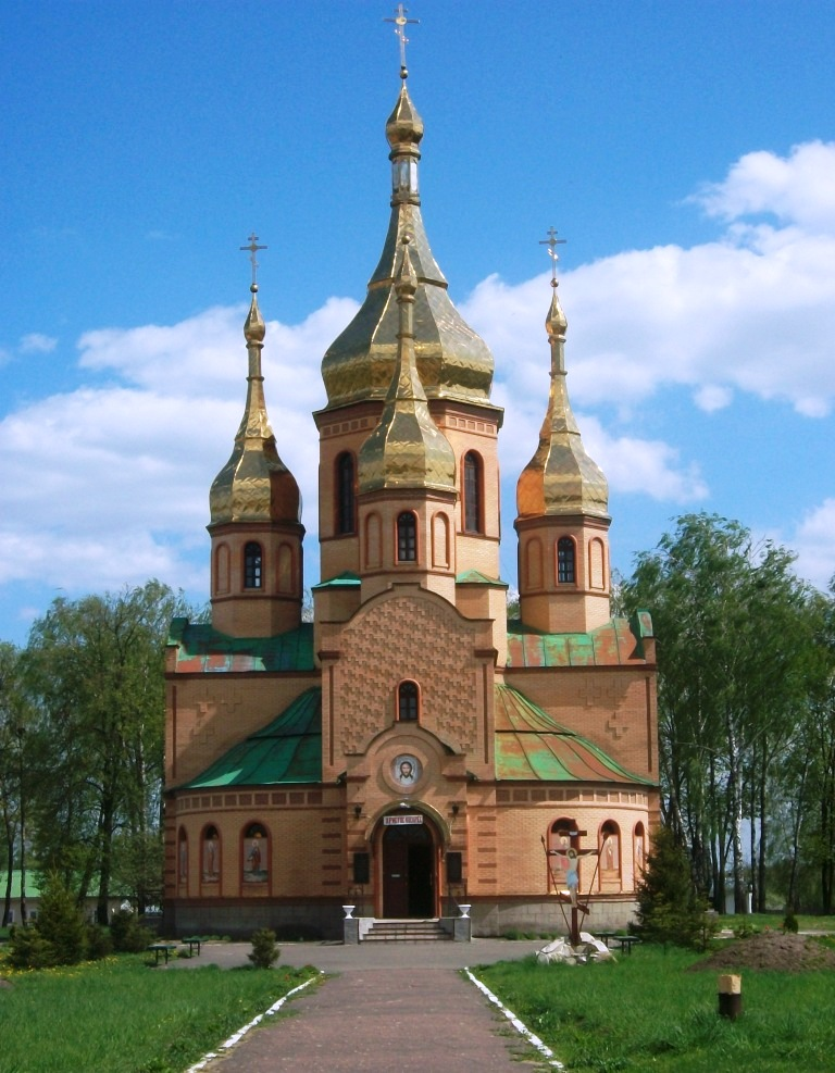 Спасо Преображенский храм. Ямполь. Сумская область